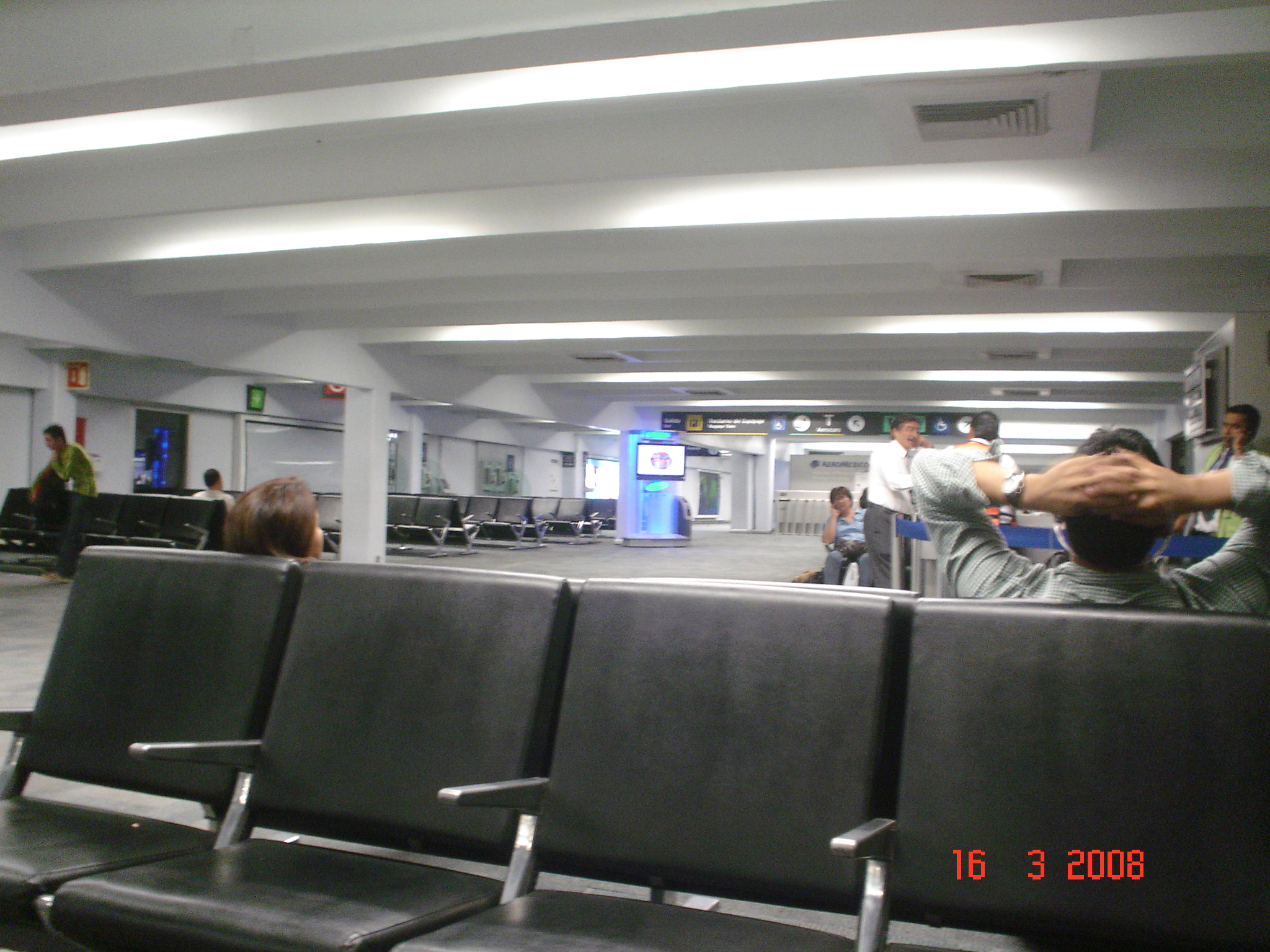 Salas de Ultima Espera del Aeropuerto de la Ciudad de Mexico